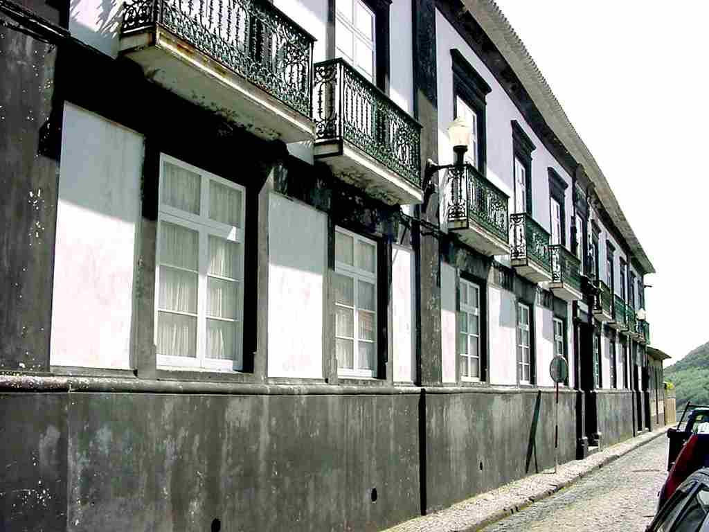 Solar dos Carvalhais, fachada principal